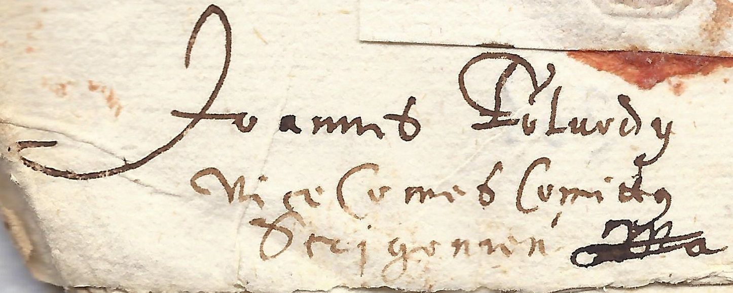 Az aláírás egy törökök okozta sérelmekkel kapcsolatos tanúkihallgatás jegyzőkönyvén található